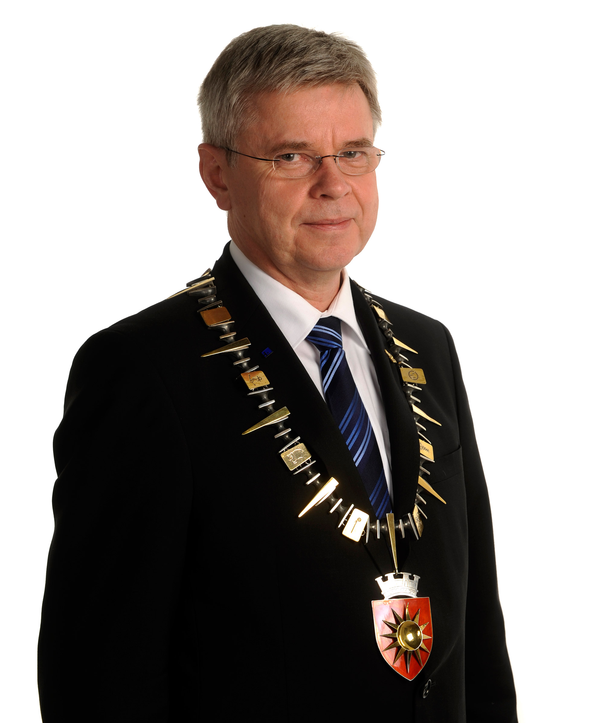 Ordføreren i Bodø kommune, Ole Henrik Hjartøy, 2012